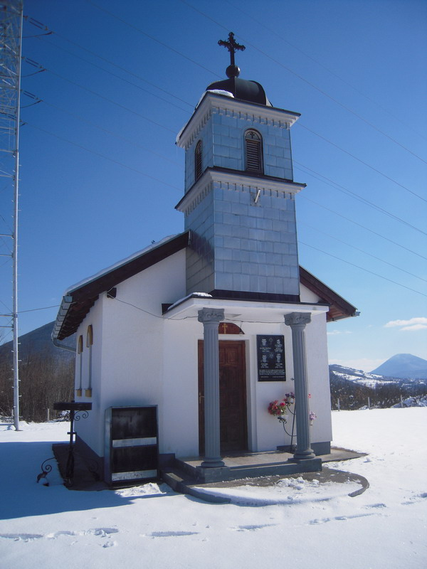 Храм_Преображења_Господњег_(Рекавице)